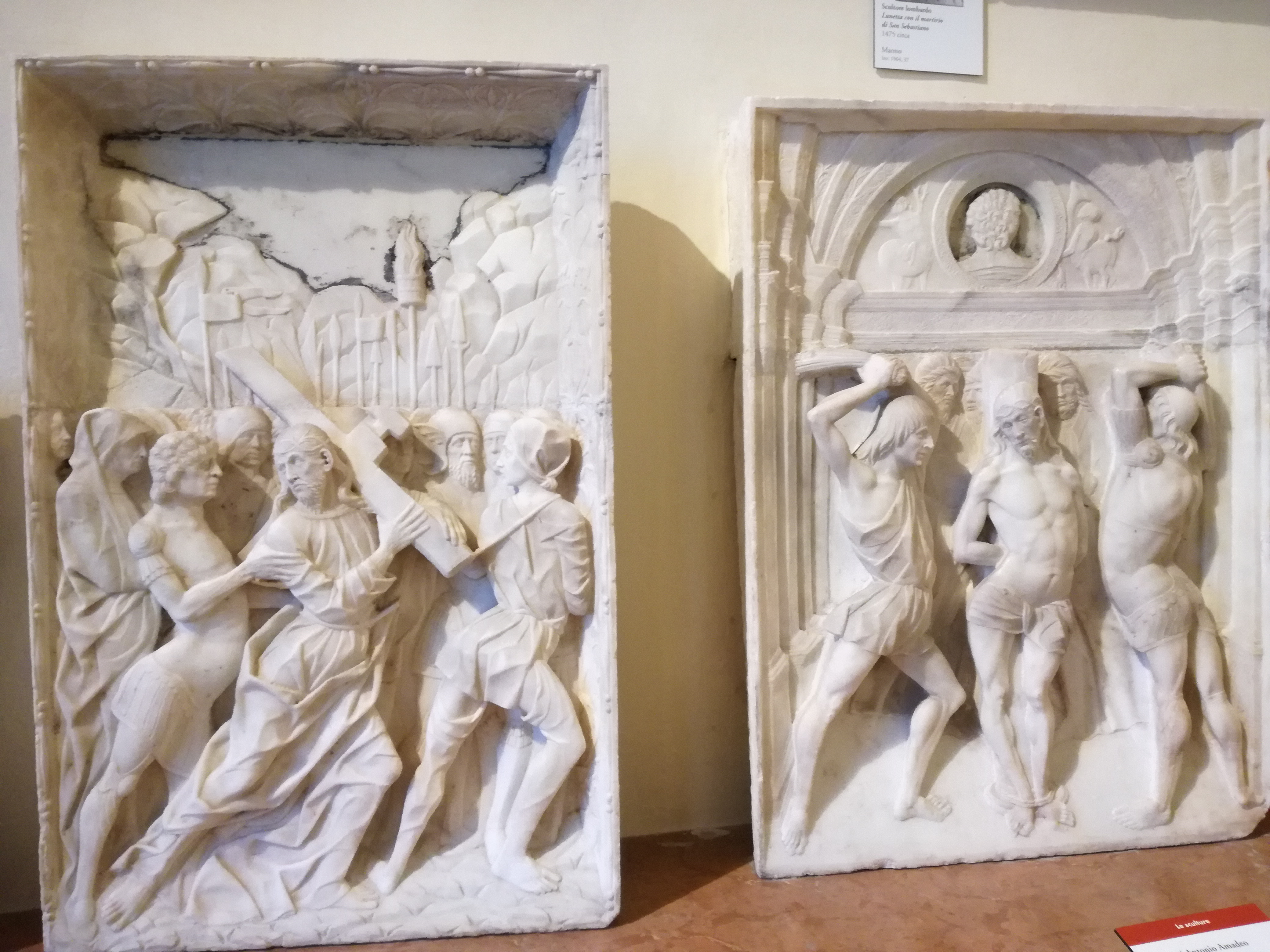 Museo della Certosa di Pavia, Scultura raffigurante la Flagellazione di Cristo di Amadeo Giovanni Antonio e Scultura raffigurante la Salita di Cristo al monte Calvario di Mantegazza Antonio (seconda metà sec. XV) Gli Inventari della Certosa del 1845 e del 1868 menzionano le lastre raffiguranti la Flagellazione e il Cristo portacroce, (l'Orazione nell'orto non viene citata) collocate sull'altare della cappella dei Novizi